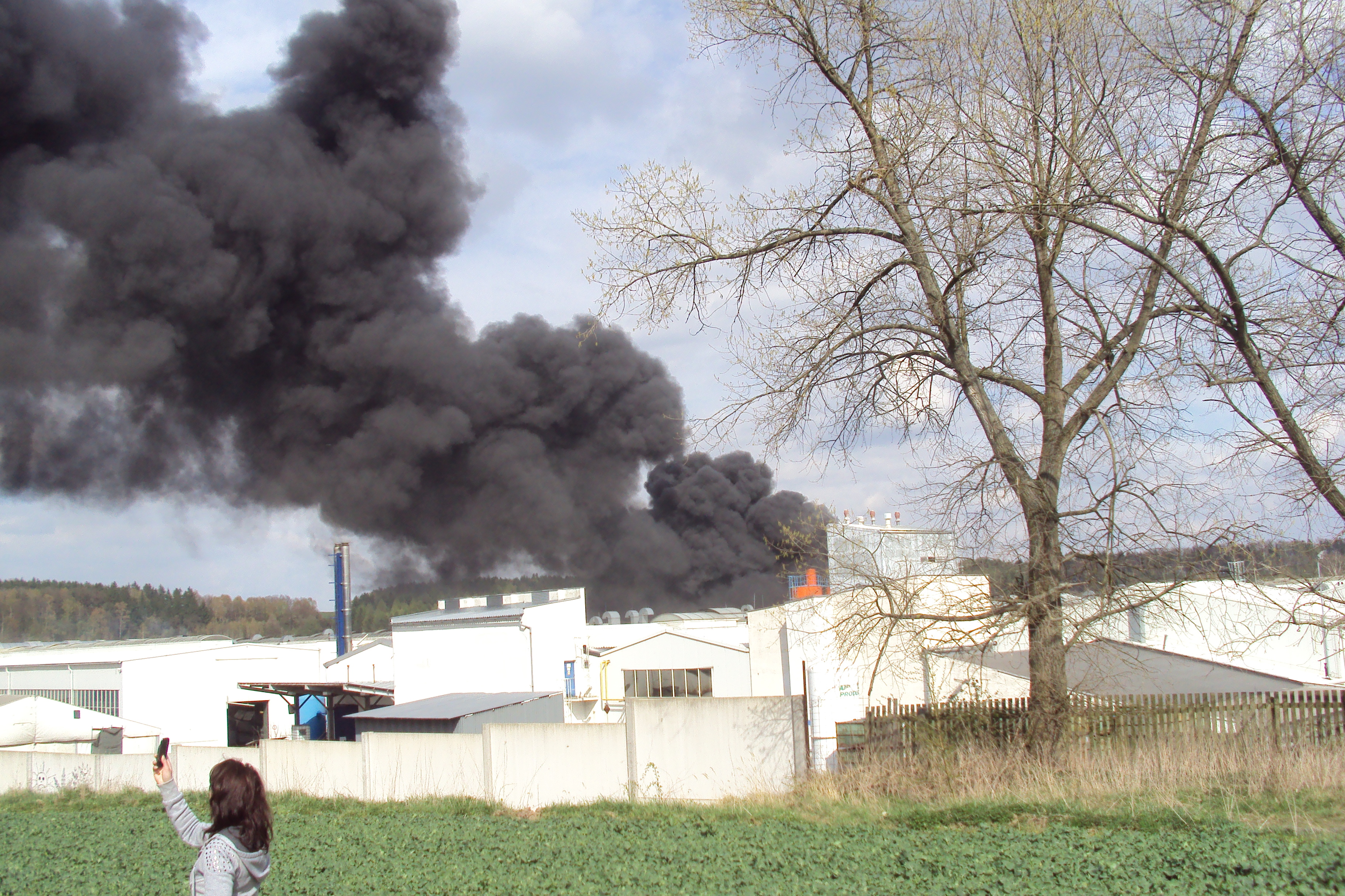 Požár plastů v areálu firmy Ladeo, vpředu na snímku budovy jiné firmy IAC